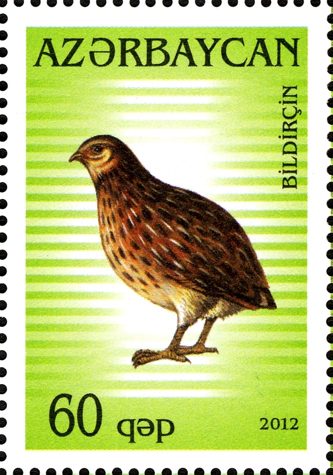 Ev quşları: bildirçin